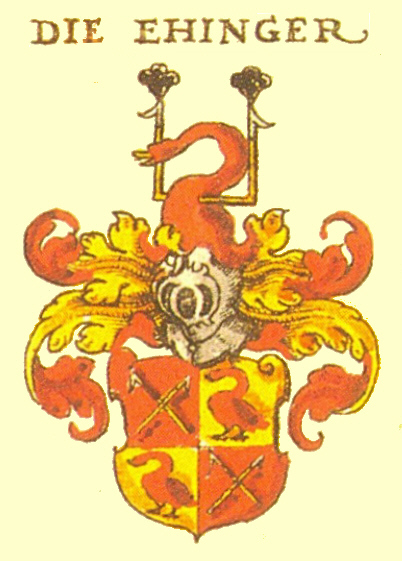 Wappen Ulmer Patrizierfamilie Ehinger